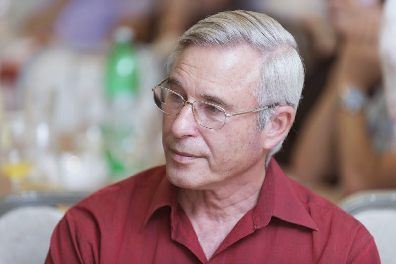 ברוך נבו הוא פרופסור אמריטוס ישראלי לפסיכולוגיה. נבו היה נשיא המכללה האקדמית צפת